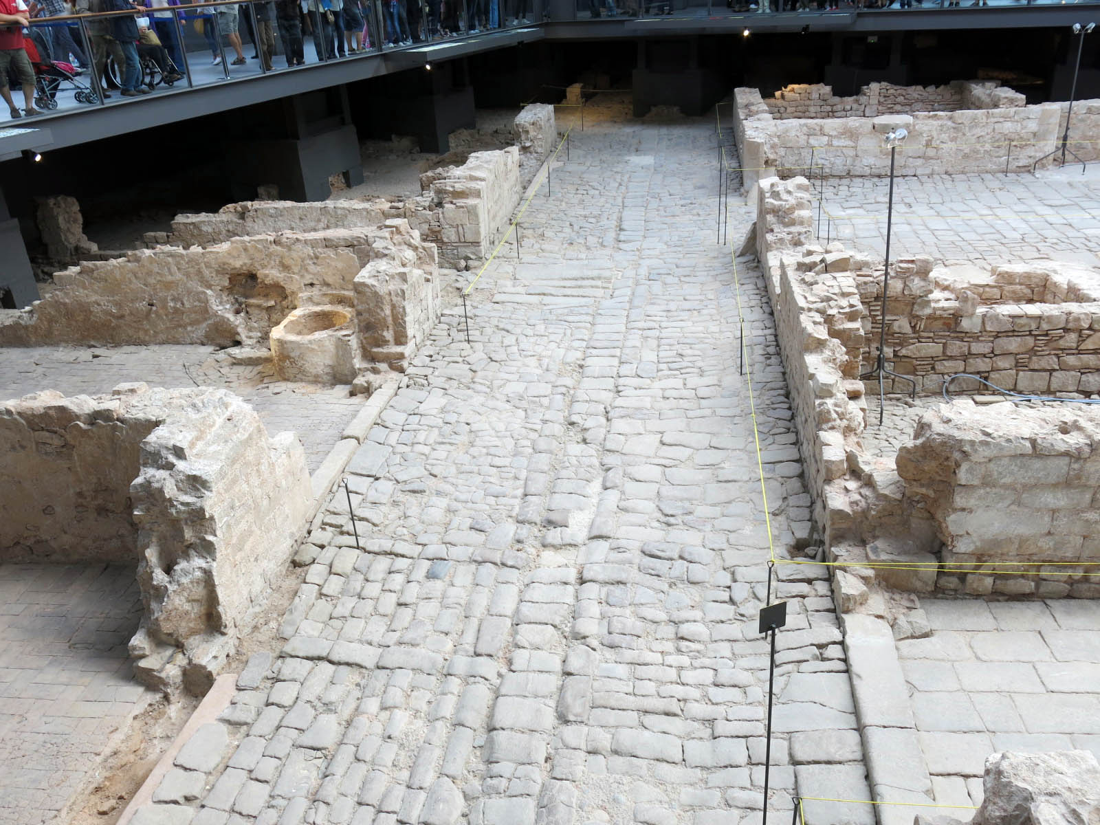 Mercat del Born (Barcelona) Object location41° 23′ 08.76″ N, 2° 11′ 01.54″ E